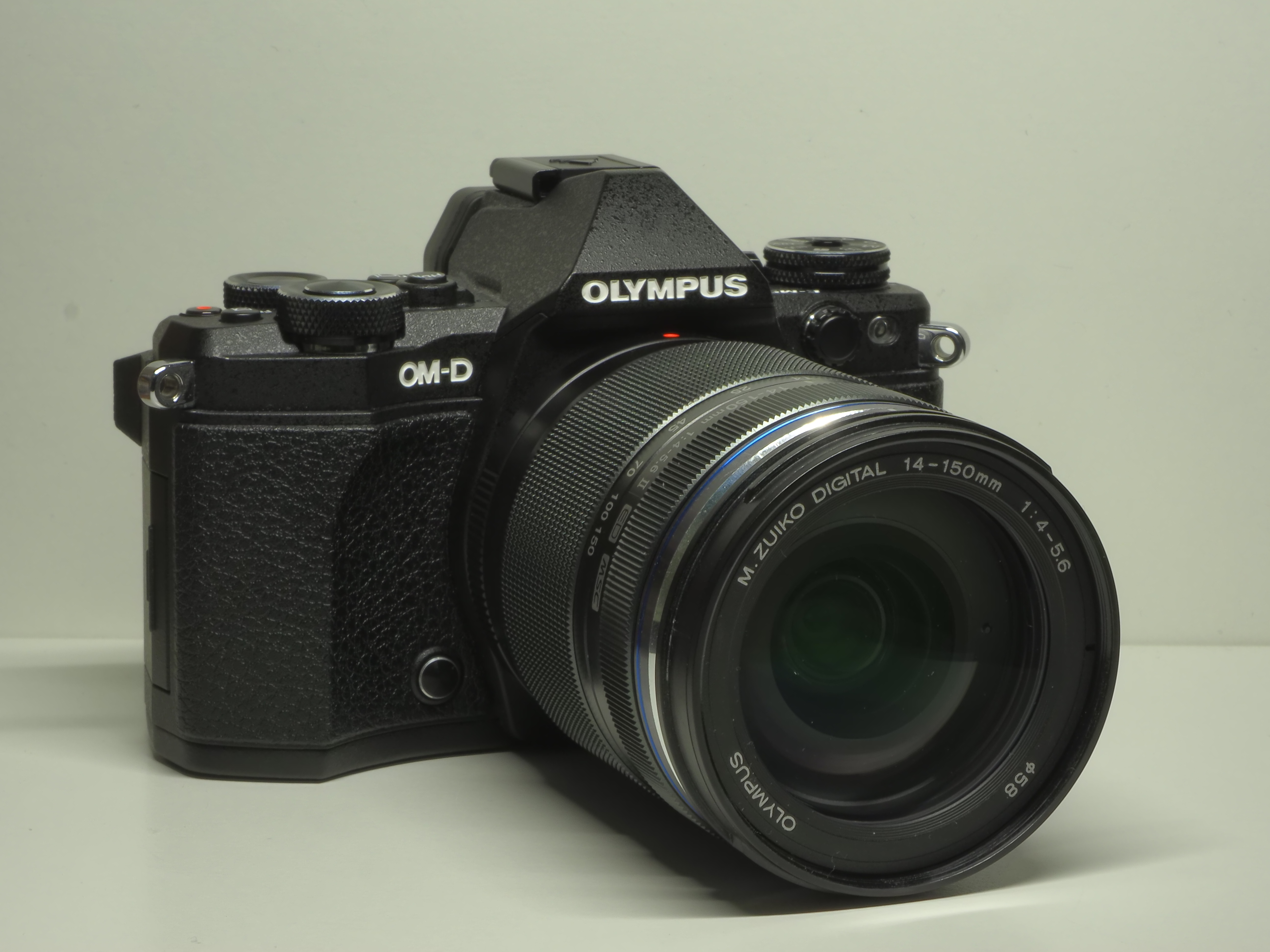 オリンパスのミラーレス一眼カメラ、OM-D E-M5 Mark IIと高倍率ズームレンズ